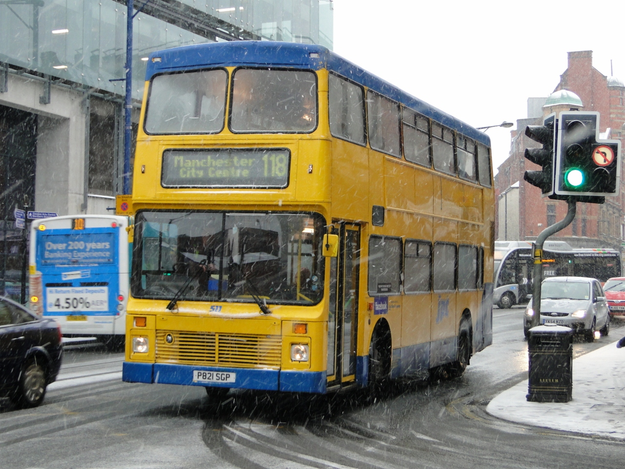 511-p821sgp-shudehill-04_12_2012 (1280x960)